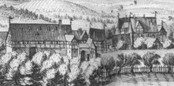 Burg Schliestett Merian